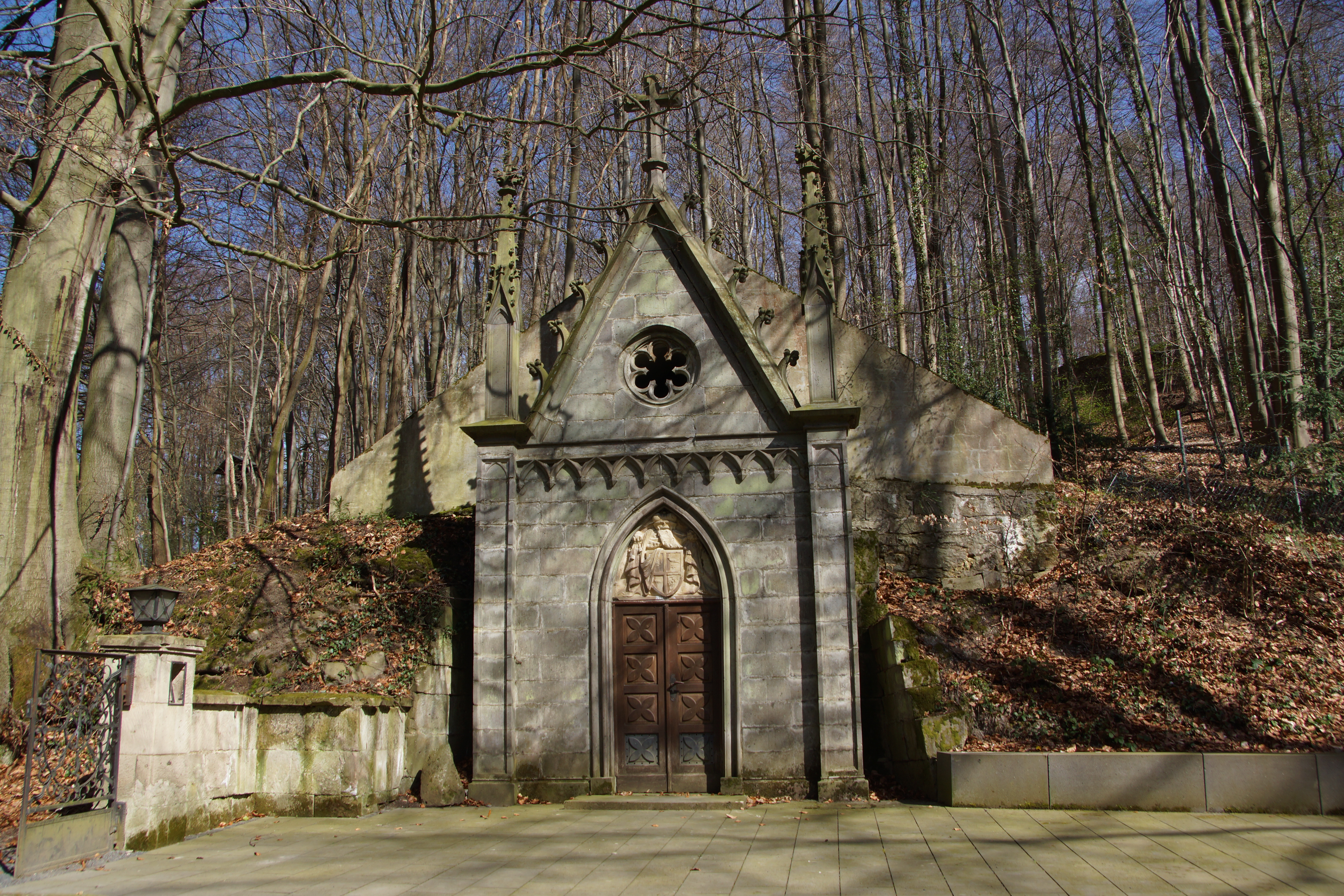 Kloster Heisterbach, 1840 als neugotische Waldkapelle entstandene Familiengruft der Grafen zur Lippe-Biesterfeld, besteht aus Stenzelberger Latit (außer Giebelfront und Teil der Seitenwände), entworfen von Ernst Friedrich Zwirner